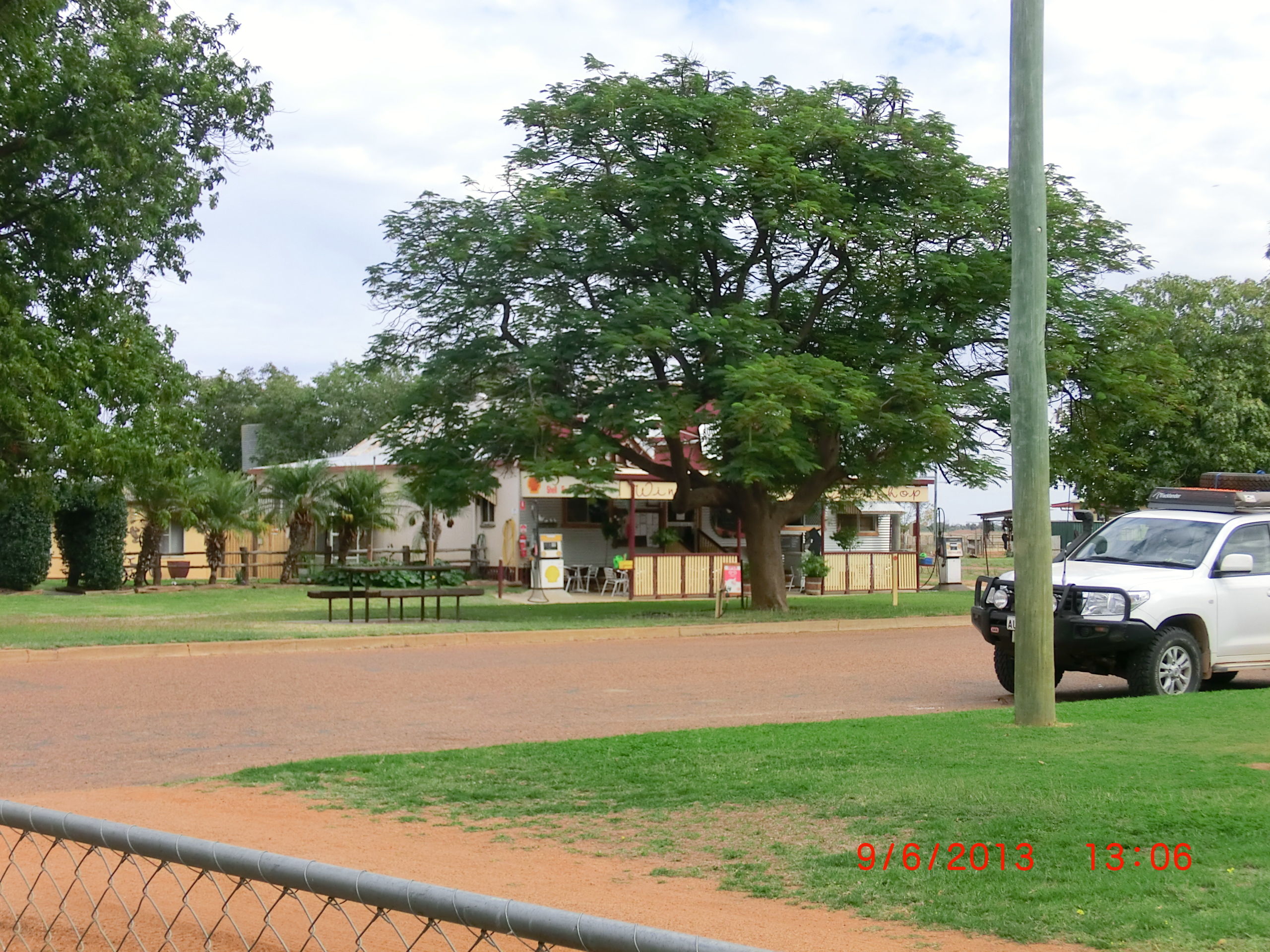 Windorah General Store